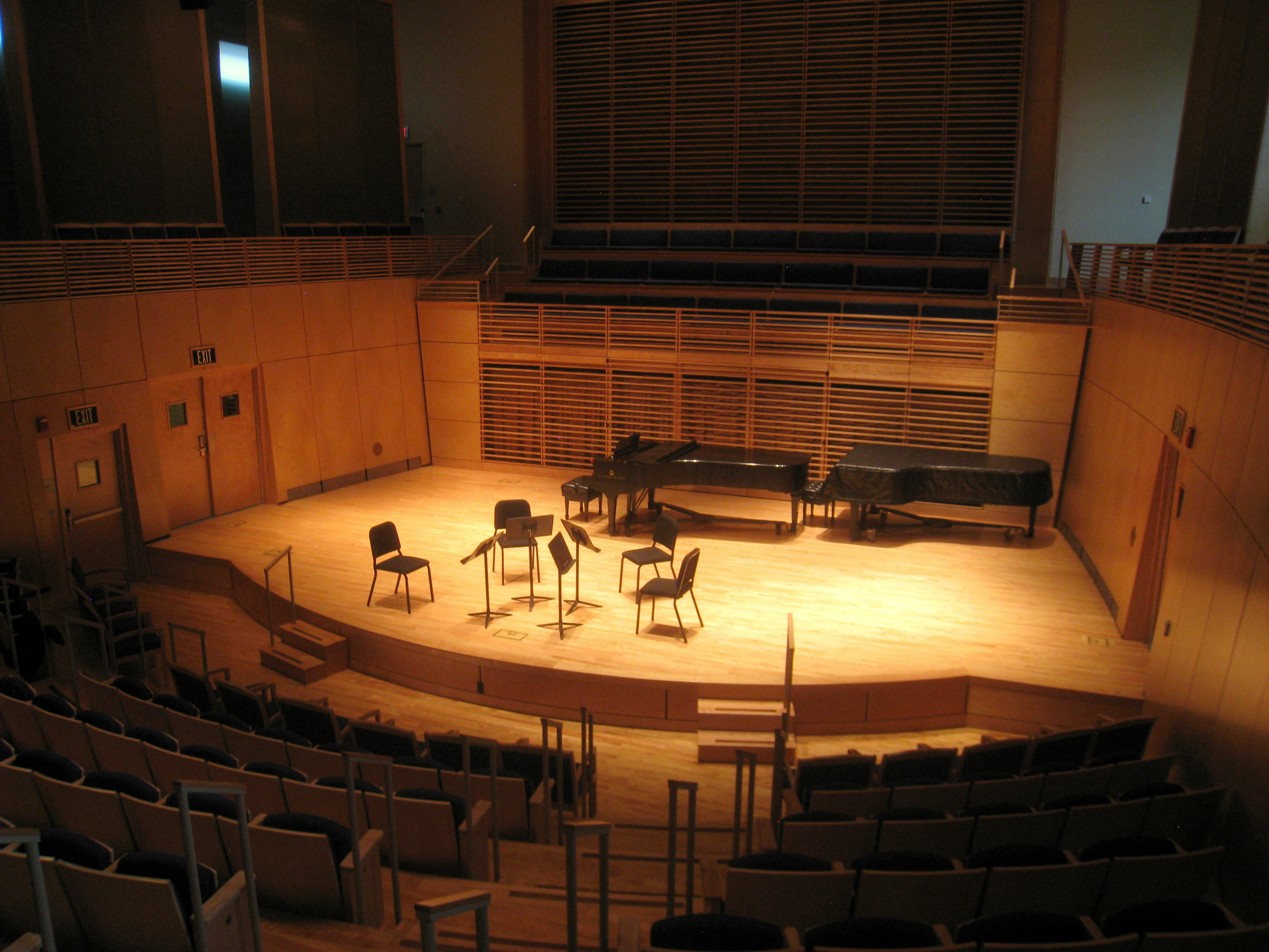 Kanbar Auditorium, Studzinski Recital Hall, Bowdoin College, Brunswick, Maine, USA.